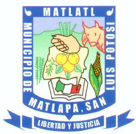 Stemma Matlapa SLP